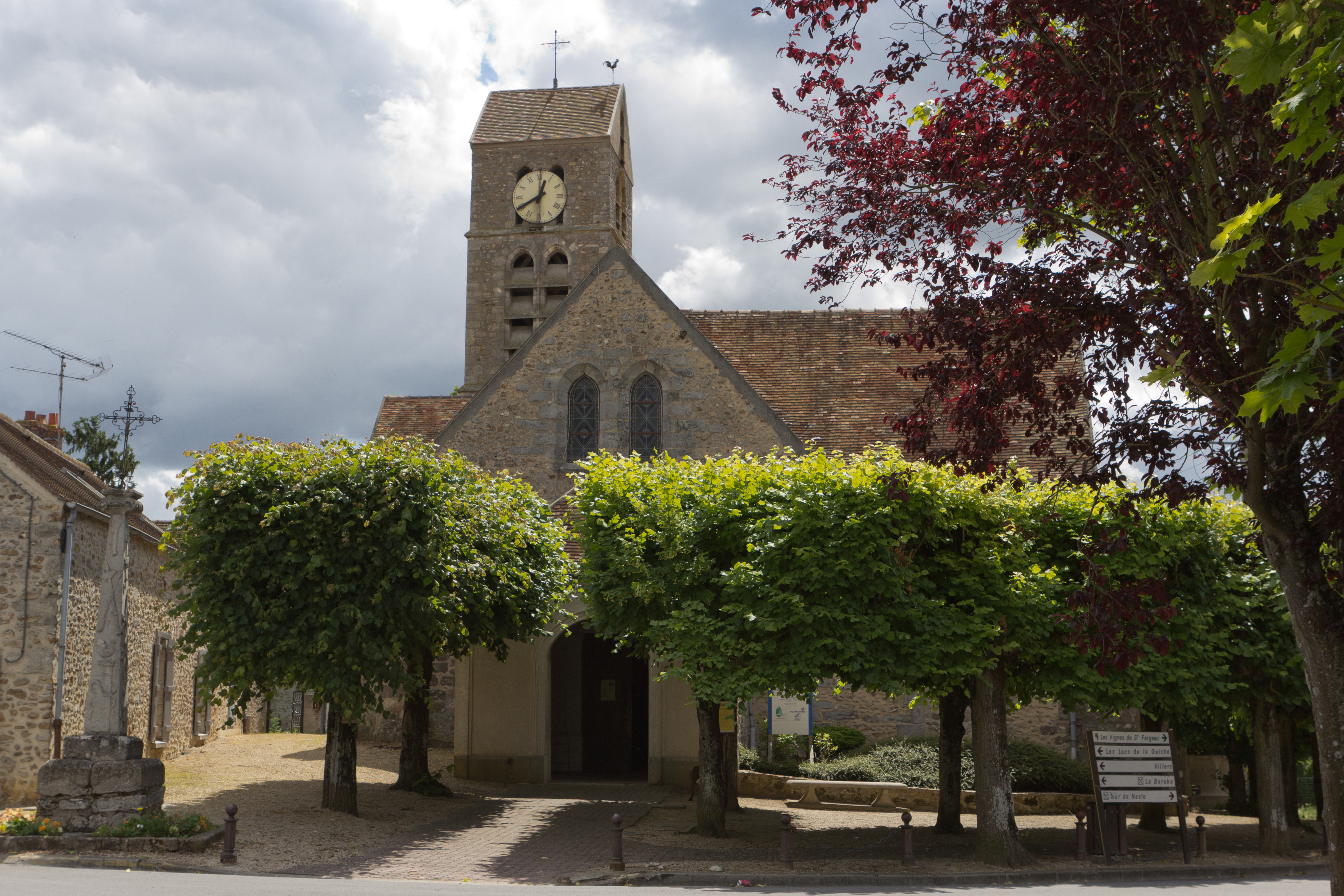 Église Saint-Ferréol de Saint-Fargeau, Saint-Fargeau-Ponthierry, Seine-et-Marne, France